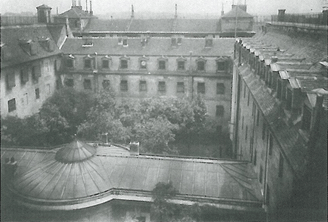 Vue intérieure d'une des cours de la prison de Sainte-Pélagie à Paris